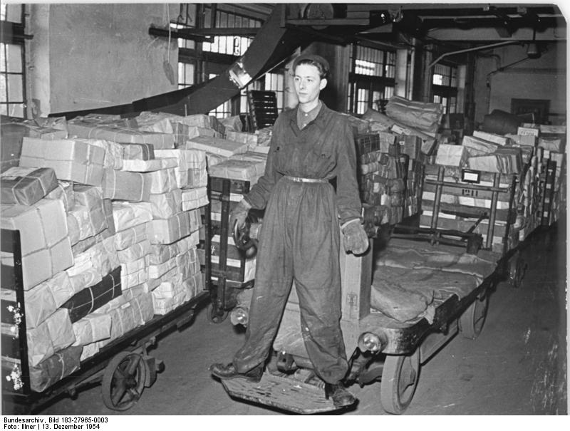 Zentralbild Illner 5Mot.13.12.1954 Weihnachtlicher Hochbetrieb beim Paketpostamt Leipzig N 18 Das Paketpostamt, Leipzig N 18, hat einem täglichen Umschlag von weit mehr als 100.000 Paketen und über 60.000 Päckchen in diesem Jahr den stärksten Weihnachtsverkehr der Nachkriegszeit. UBz: Um die Paketflut zu bewältigen, fahren die Elektrokarren innerhalb des Postamtes mit fünf Anhängern.